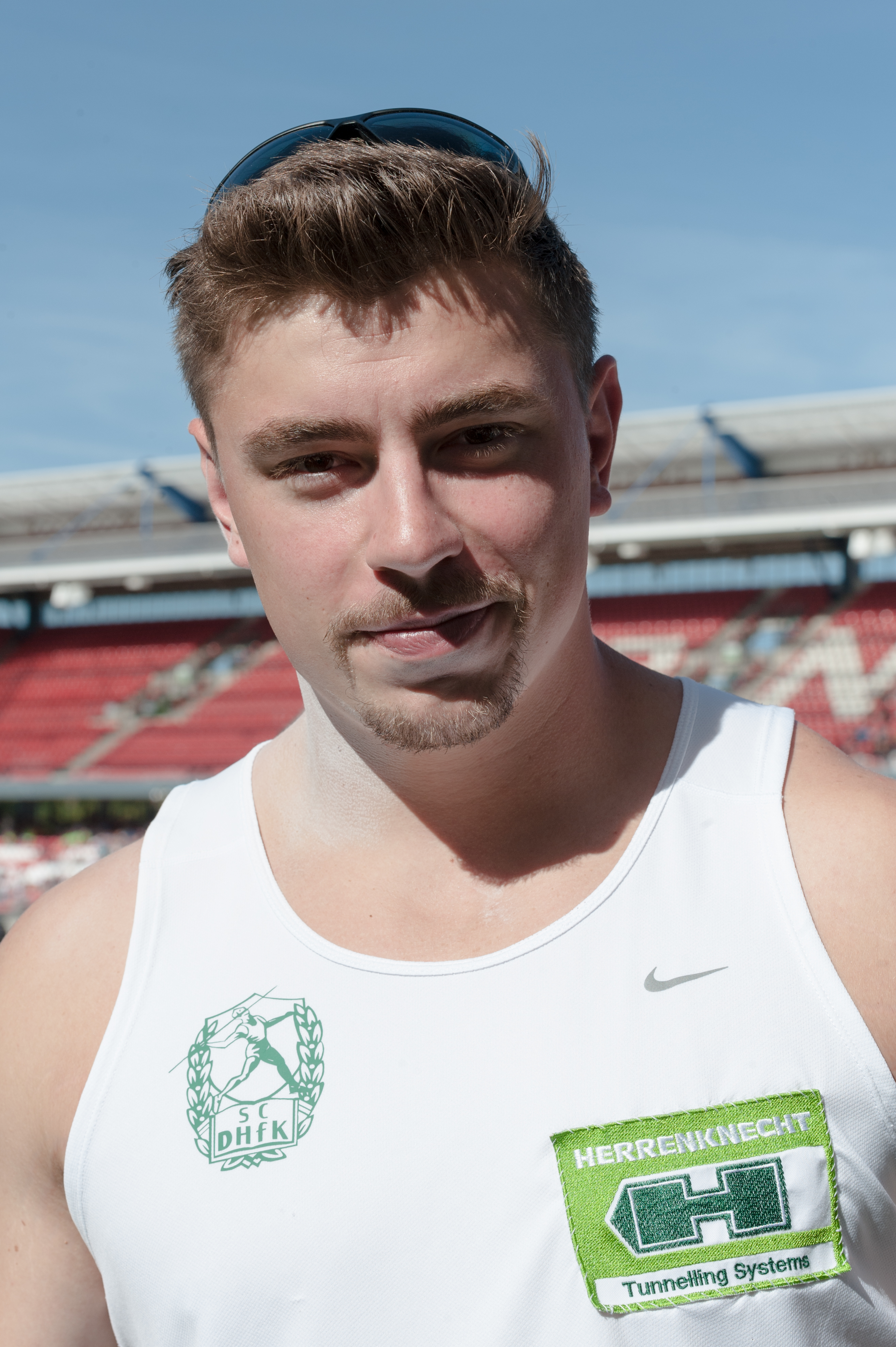 Deutsche Leichtathletik-Meisterschaften 2015: Männer Kugelstoßen - David Storl, SC DHFK Leipzig